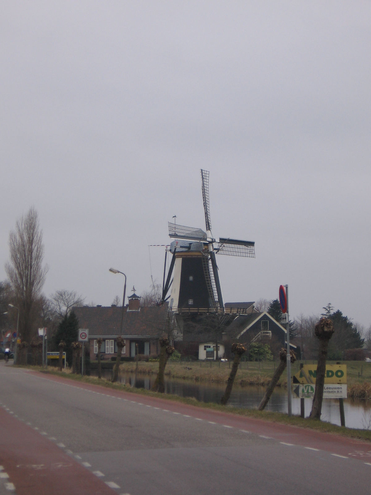 Rijnwoude and surroundings